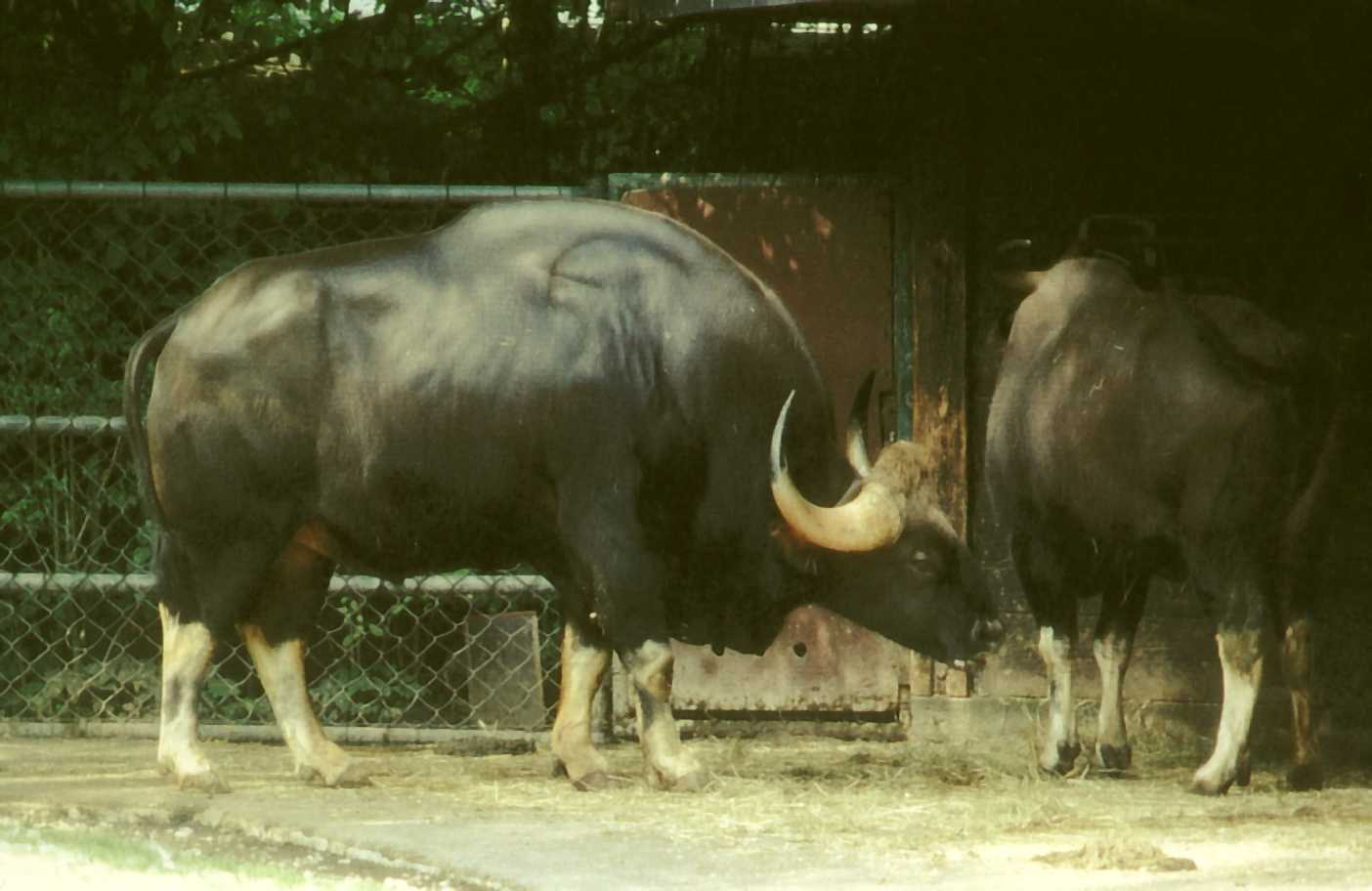 Male Gaur (Bos gaurus) at Zoo Munich